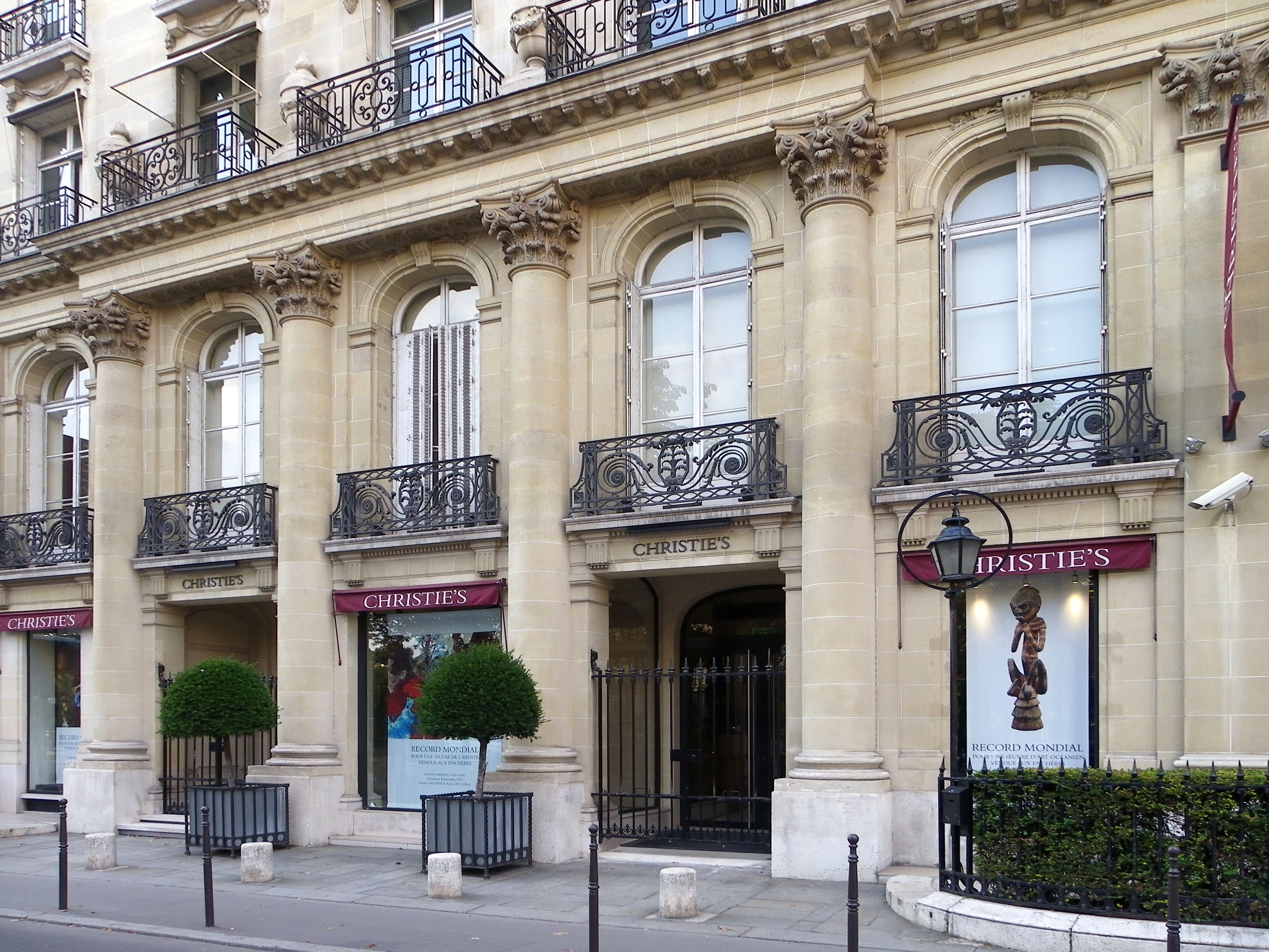 Siège de la maison de ventes aux enchères Christie's France au 9 avenue Matignon à Paris